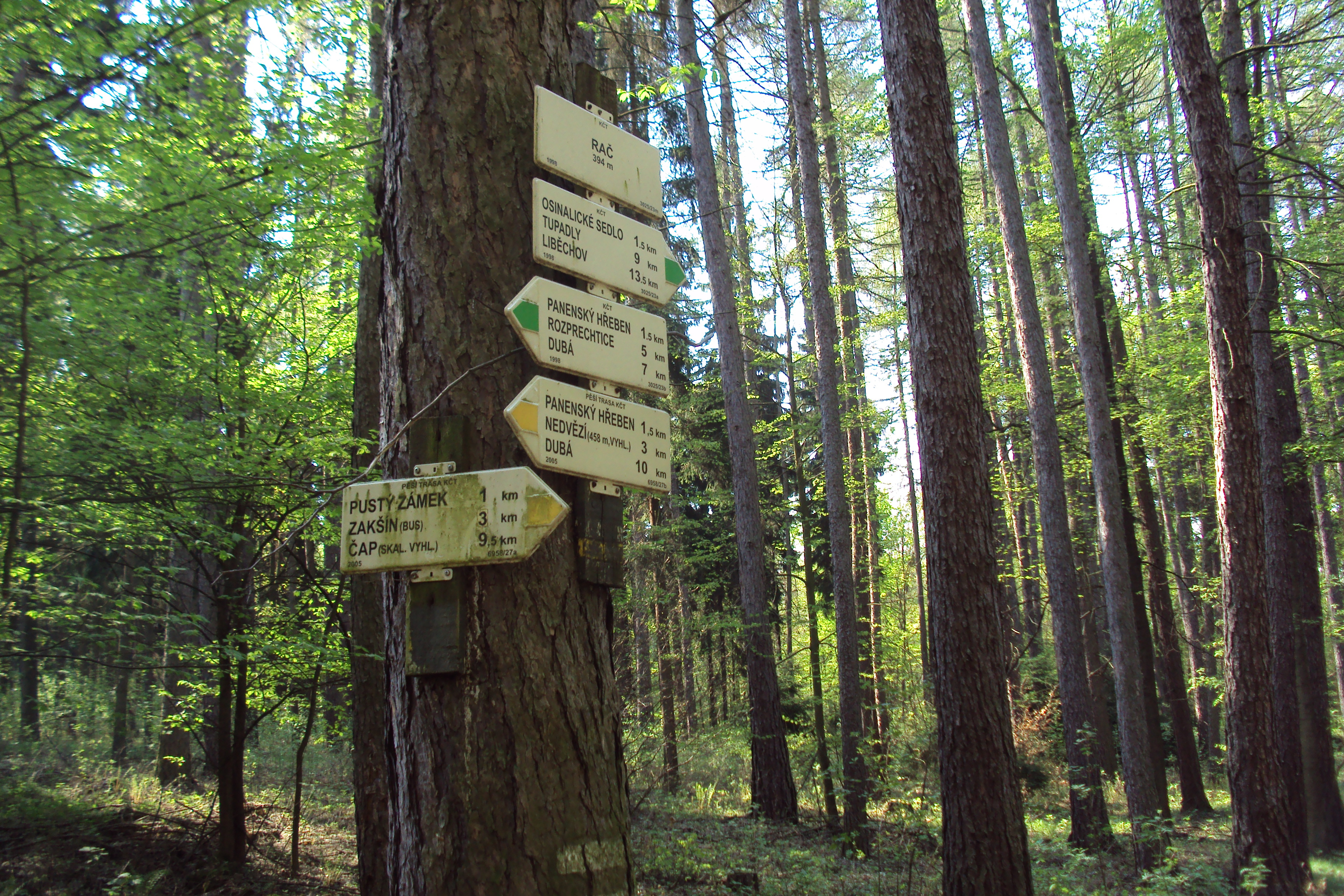 Rozcestník u kopce a skalního města Rač, katastr Deštná u Dubé